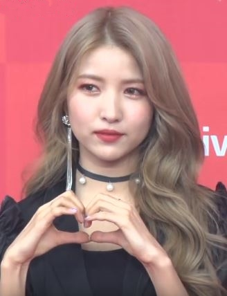 디스패치 구독 클릭! Dispatch Subscribe